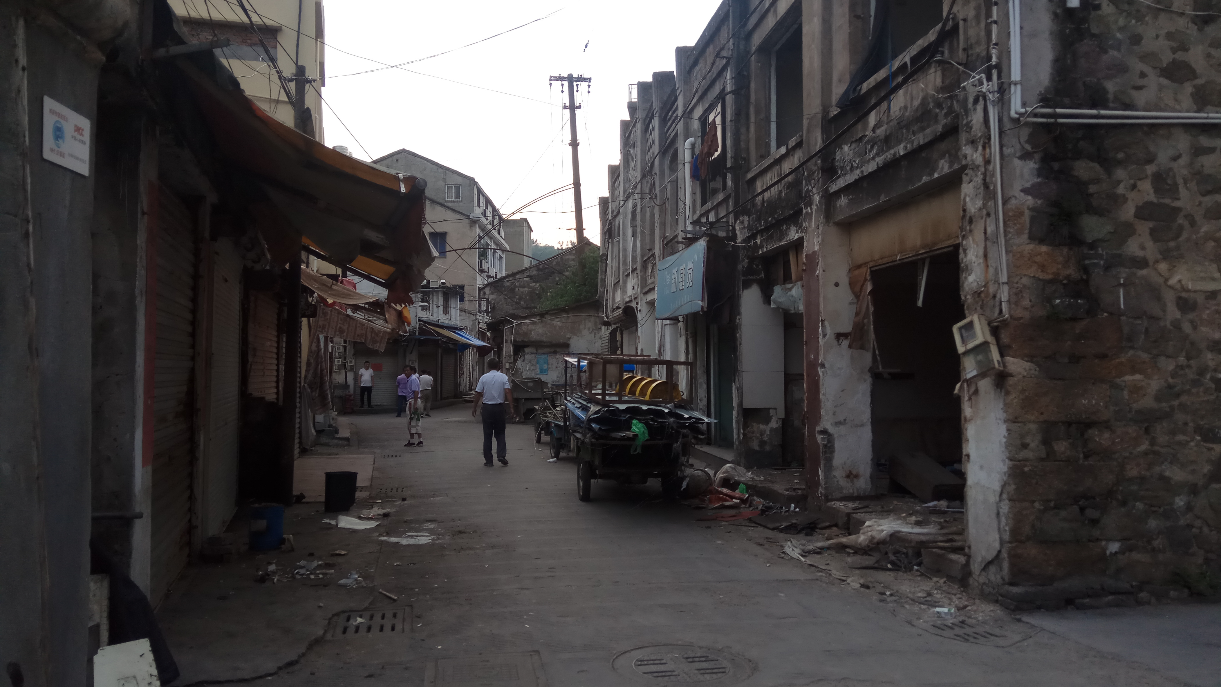 中文（中国大陆）: 浙江省玉环市西青街